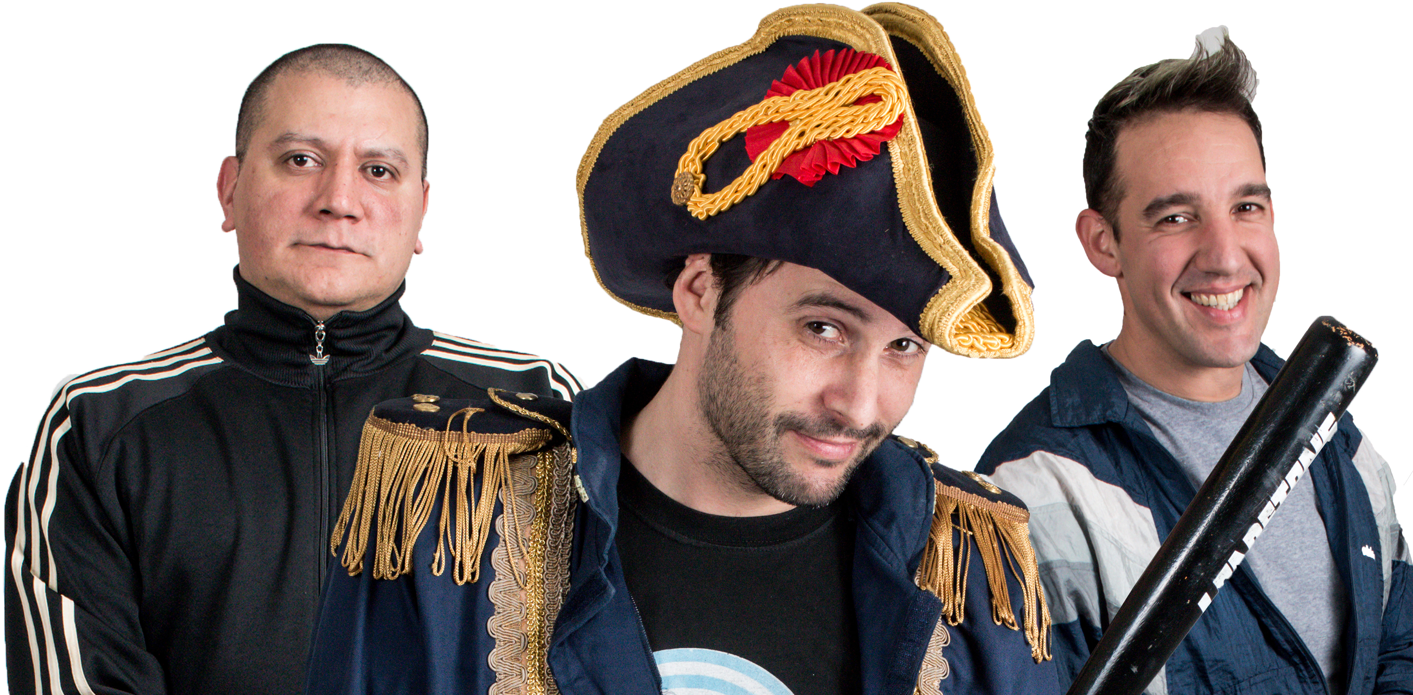 Foto de Prensa de Científicos del Palo 2017